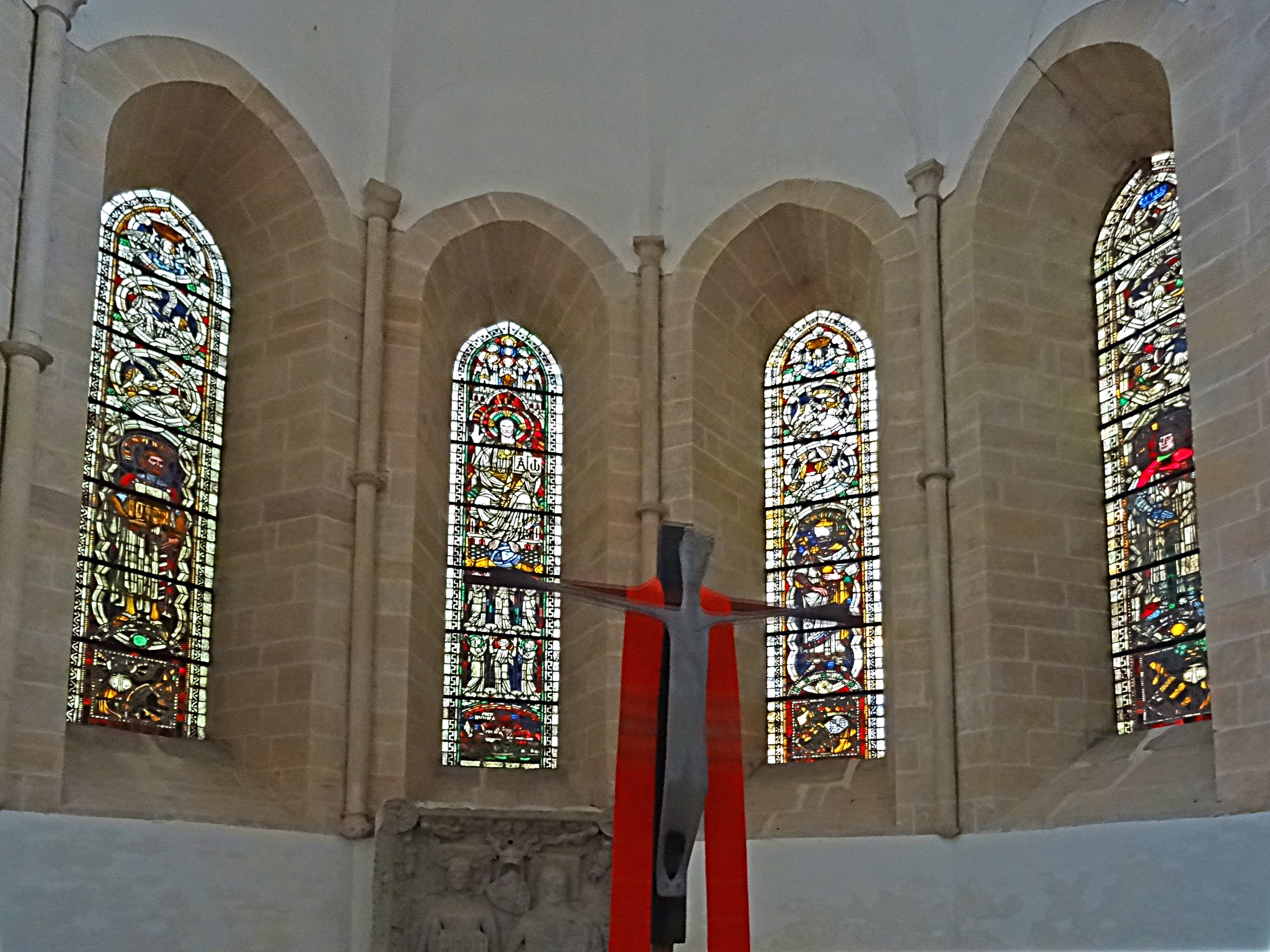 Chorfenster mit Buntglasfenstern in der Klosterkirche St. Marien und St. Cyprian (Nienburg)